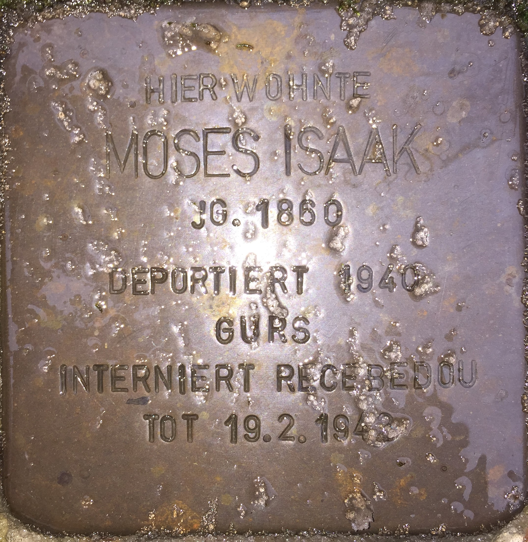 Der Stolperstein von Moses Isaak